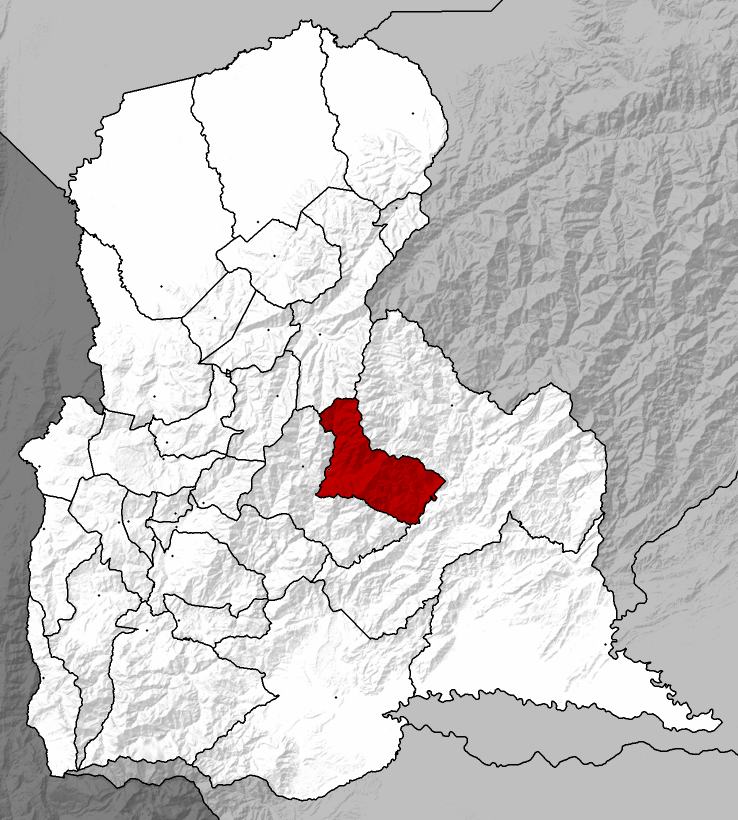 Municipio Francisco de Miranda - Táchira